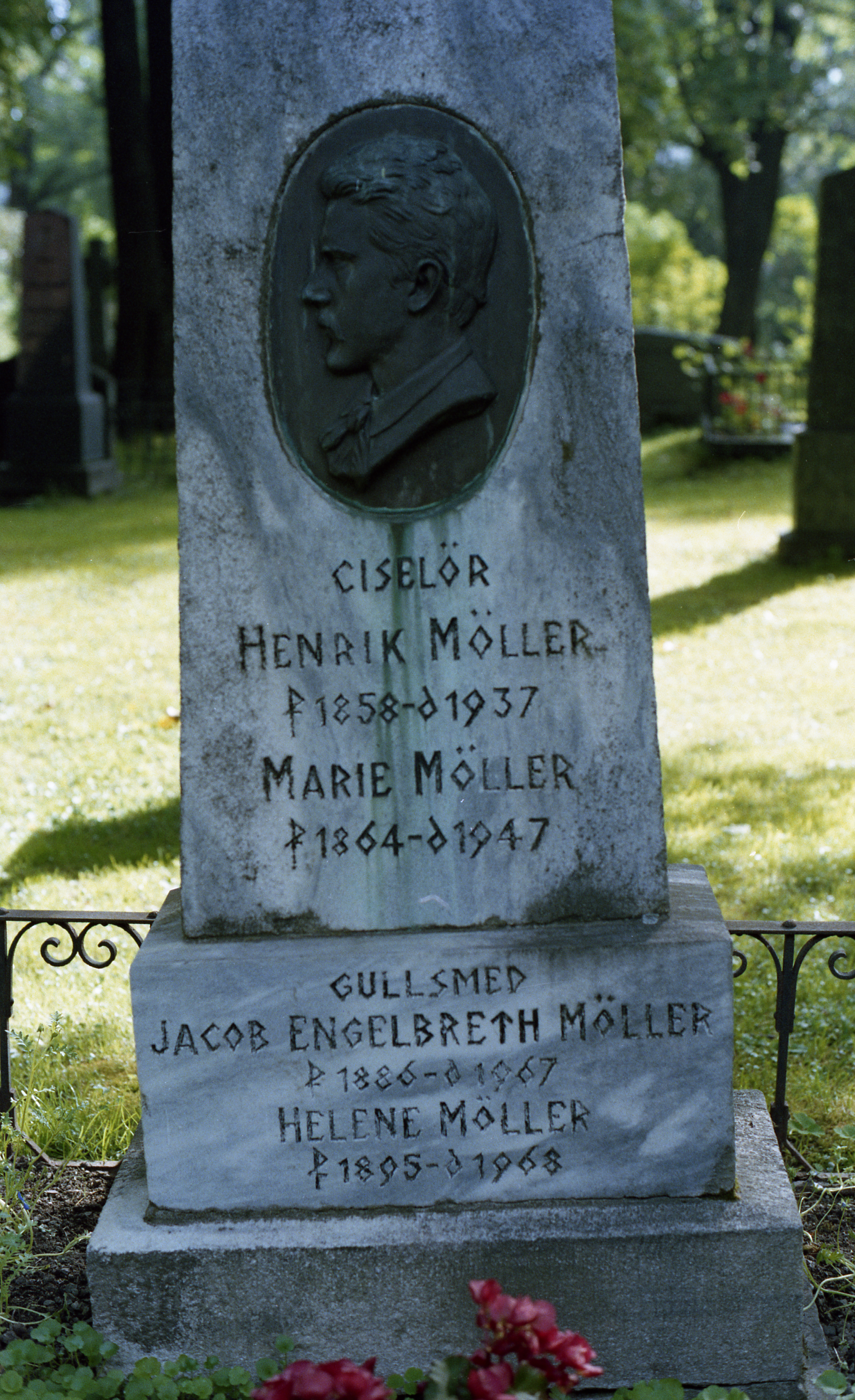 Format: Negativ 35 mm film Film: Fuji HR 100 Dato / Date: ca. 1990 Fotograf / Photographer: Byantikvaren Sted / Place: Domkirkegården, Trondheim DIS-Norge: Gravminner i Norge Eier / Owner Institution: Trondheim byarkiv, The Municipal Archives of Trondheim Arkivreferanse / Archive reference: Tor.H43.B76.F18603 [Film 01] - Ciselør Henrik Møller f. 1858 - d. 1937 - Marie Møller f. 1864 - d. 1947 - Gullsmed Jacob Engelbreth Møller f. 1886 - d. 1967 - Helene Møller f. 1895 - d. 1968